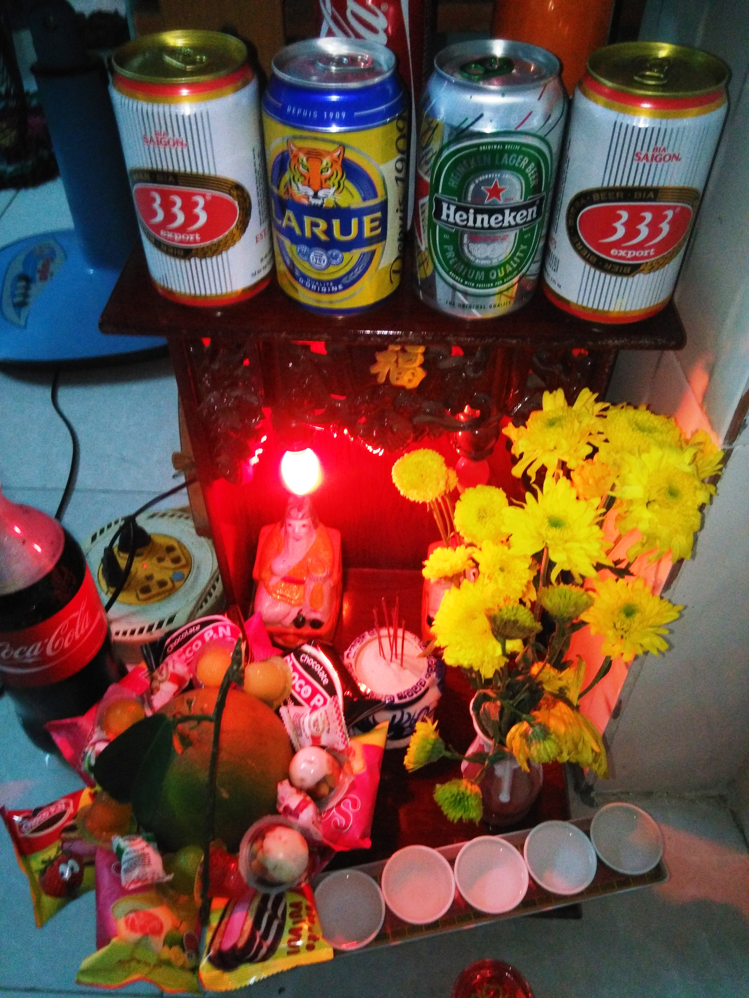 Cúng giao thừa tại Bình Tân năm 2016